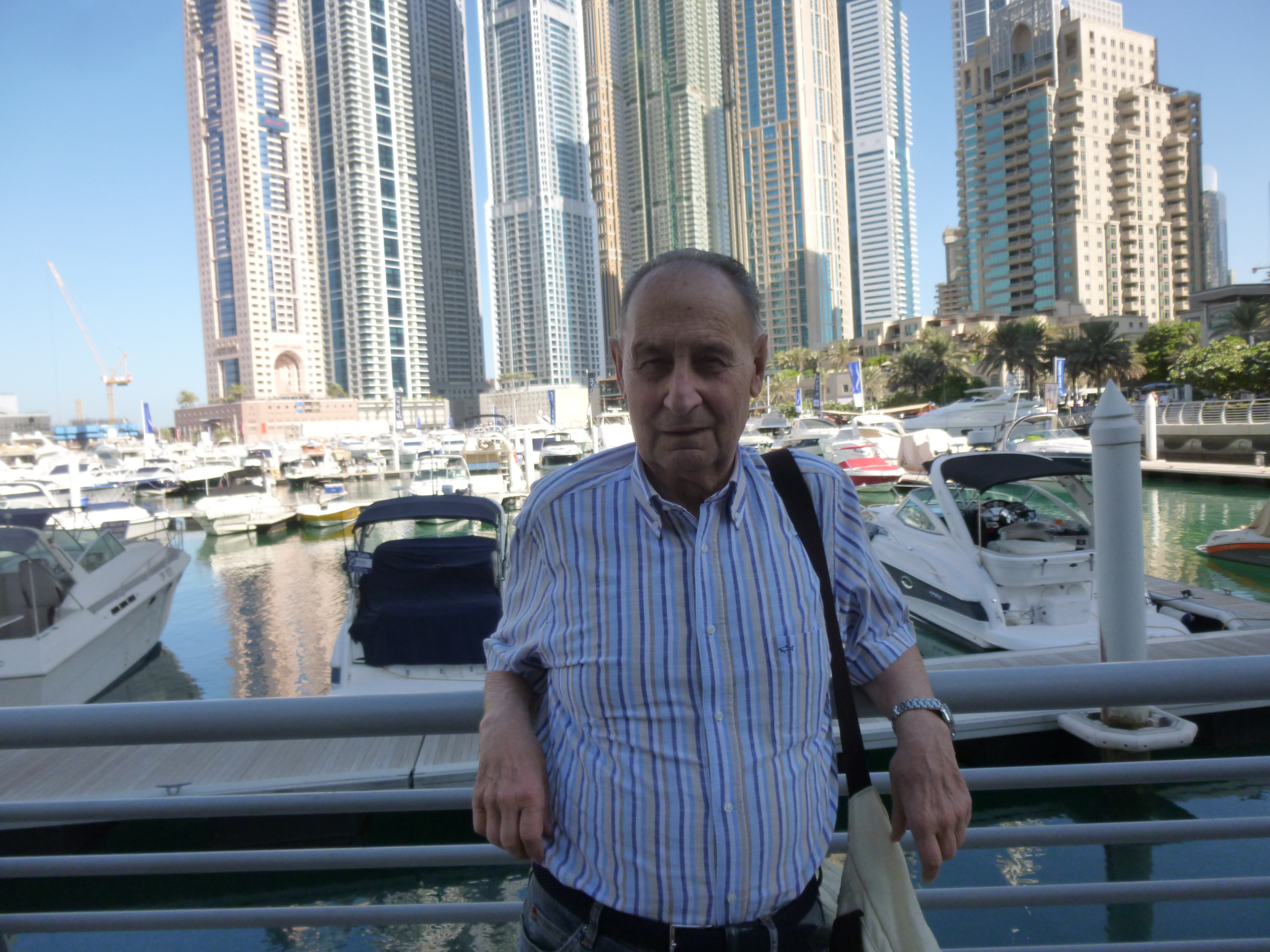 Roberto Gandini